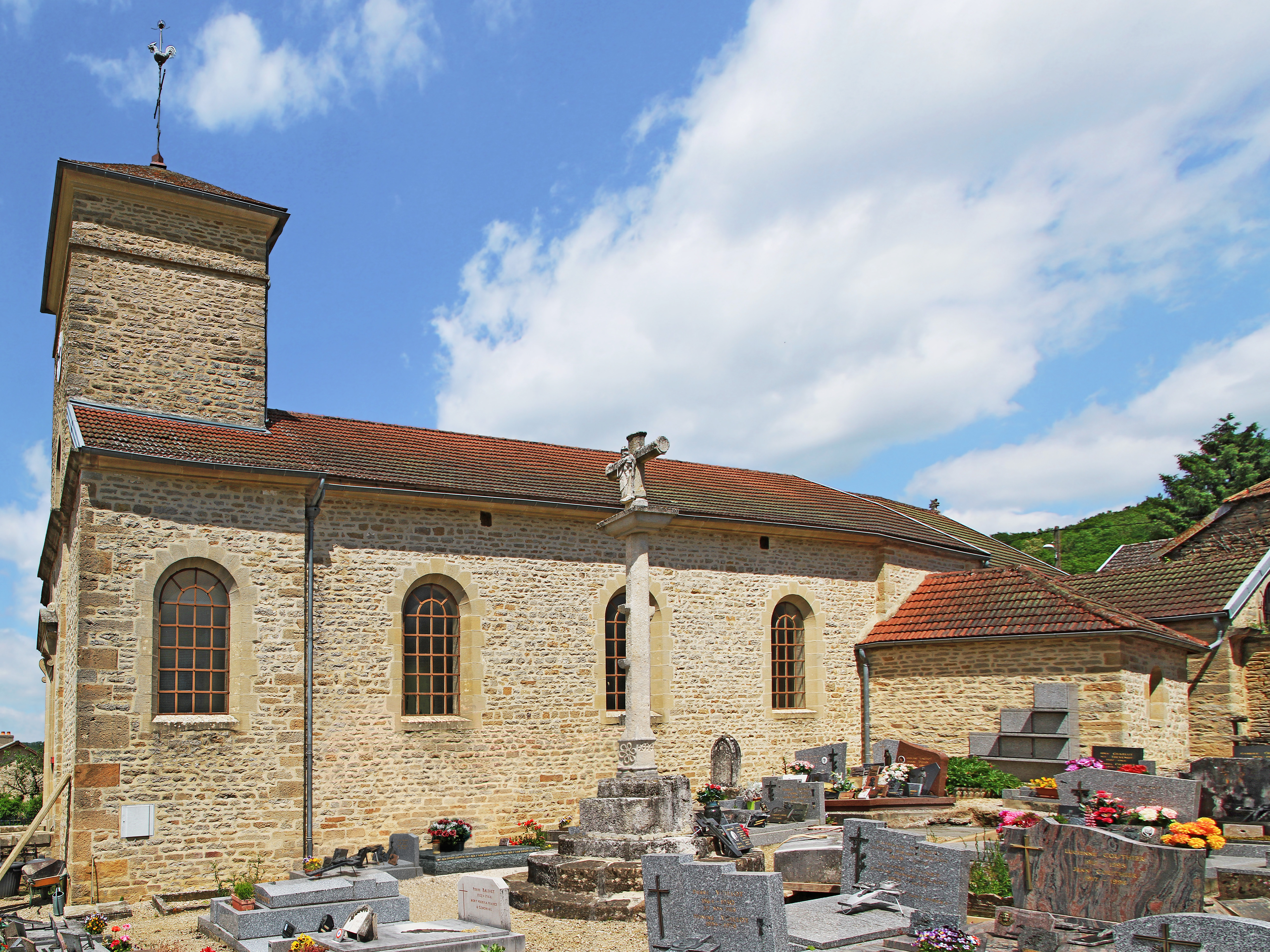 Église de la Nativité de Chevannay